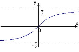 Graf funkce arkus tangens.